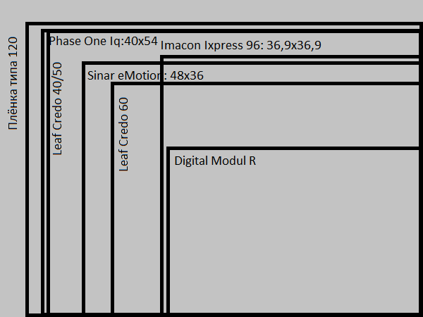 Размер матрицы в цифровом заднике